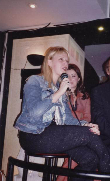 Јелена Ђуровић на промоцији романа "Краљевство", Београд, Новембар 2003.